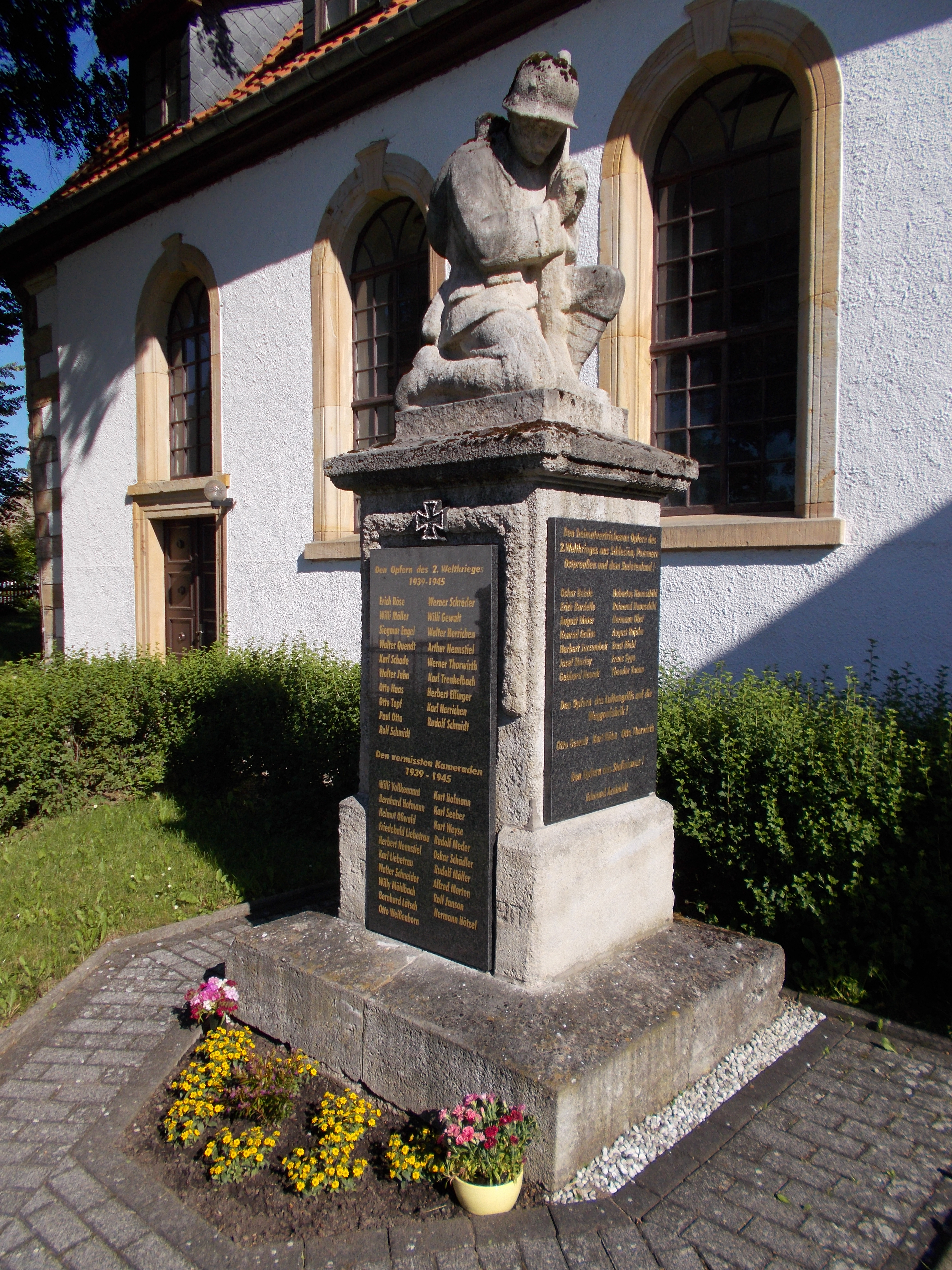 Bild zeigt das Kriegerdenkmal von Hochheim (Thür.).